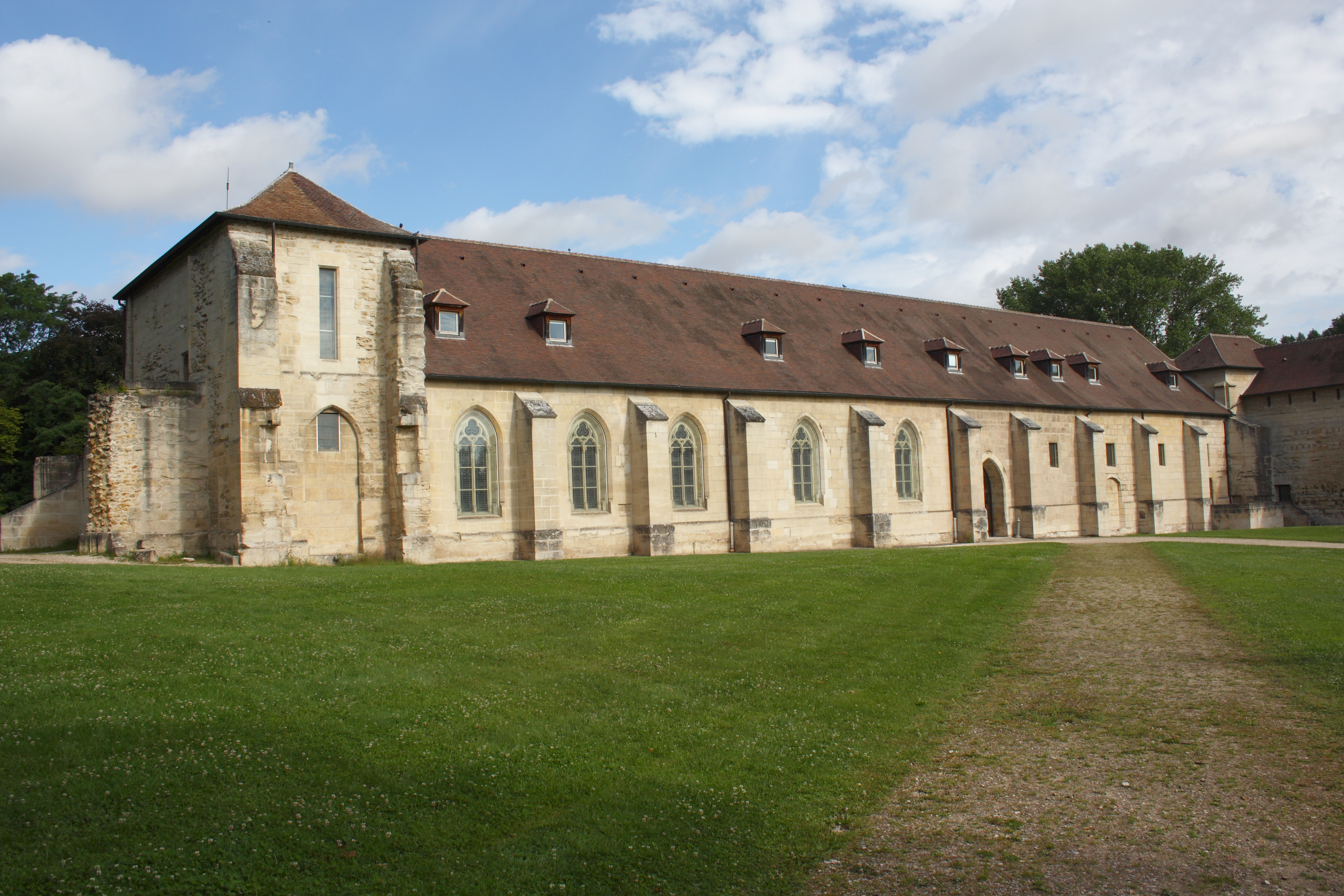 Abbaye de Maubuisson in Saint-Ouen-l'Aumône im Département Val-d’Oise der Île-de-France (Frankreich)